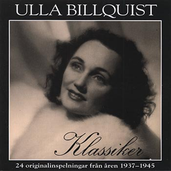 CD-häftet till skivan Ulla Billquist Klassiker. Den första skivan som gavs ut av Klara Skivan.